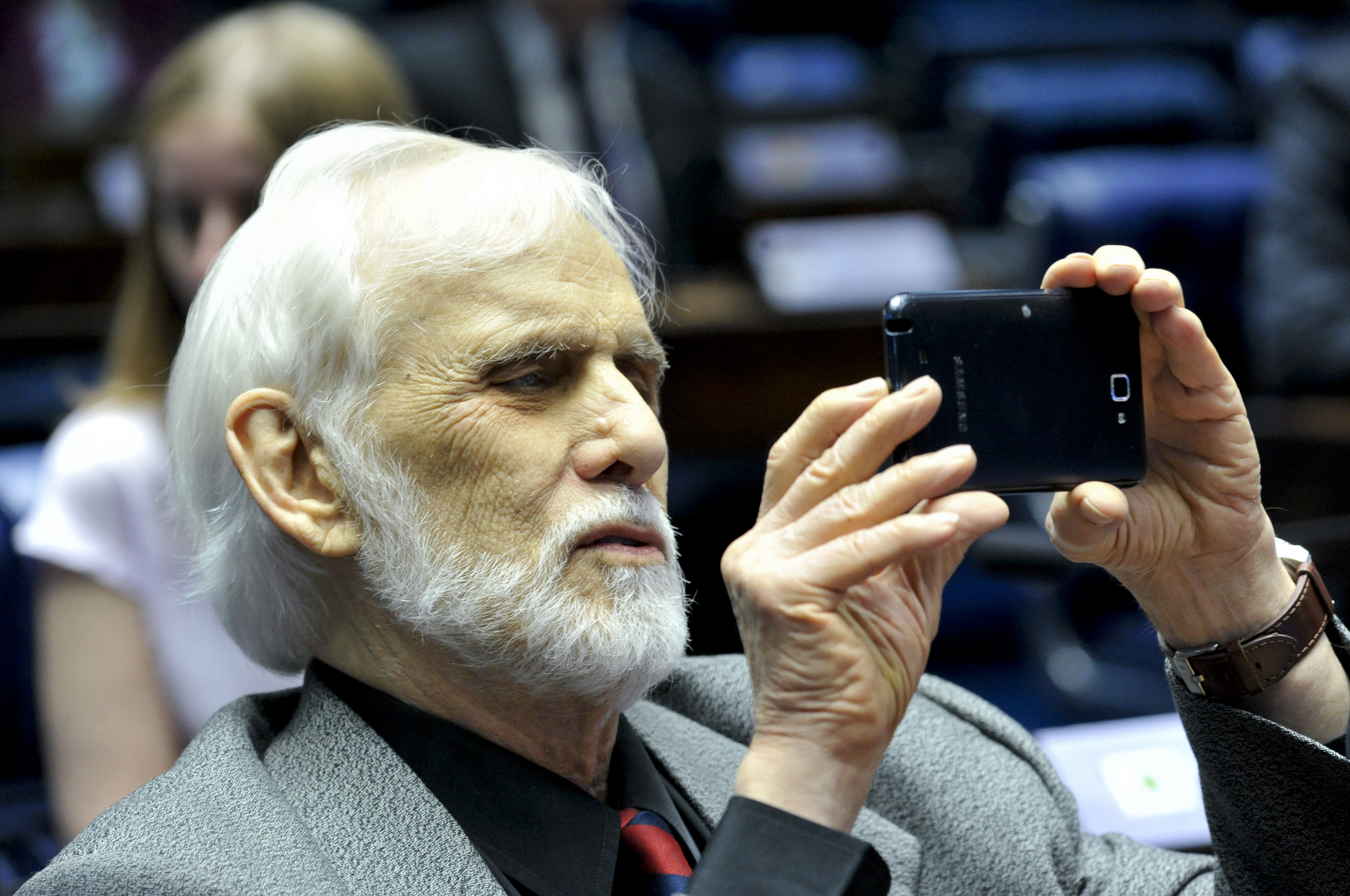 Plenário do Senado Federal durante sessão especial para comemorar o cinquentenário das atividades da TV Globo. Ator Francisco Cuoco. Foto: Geraldo Magela/Agência Senado